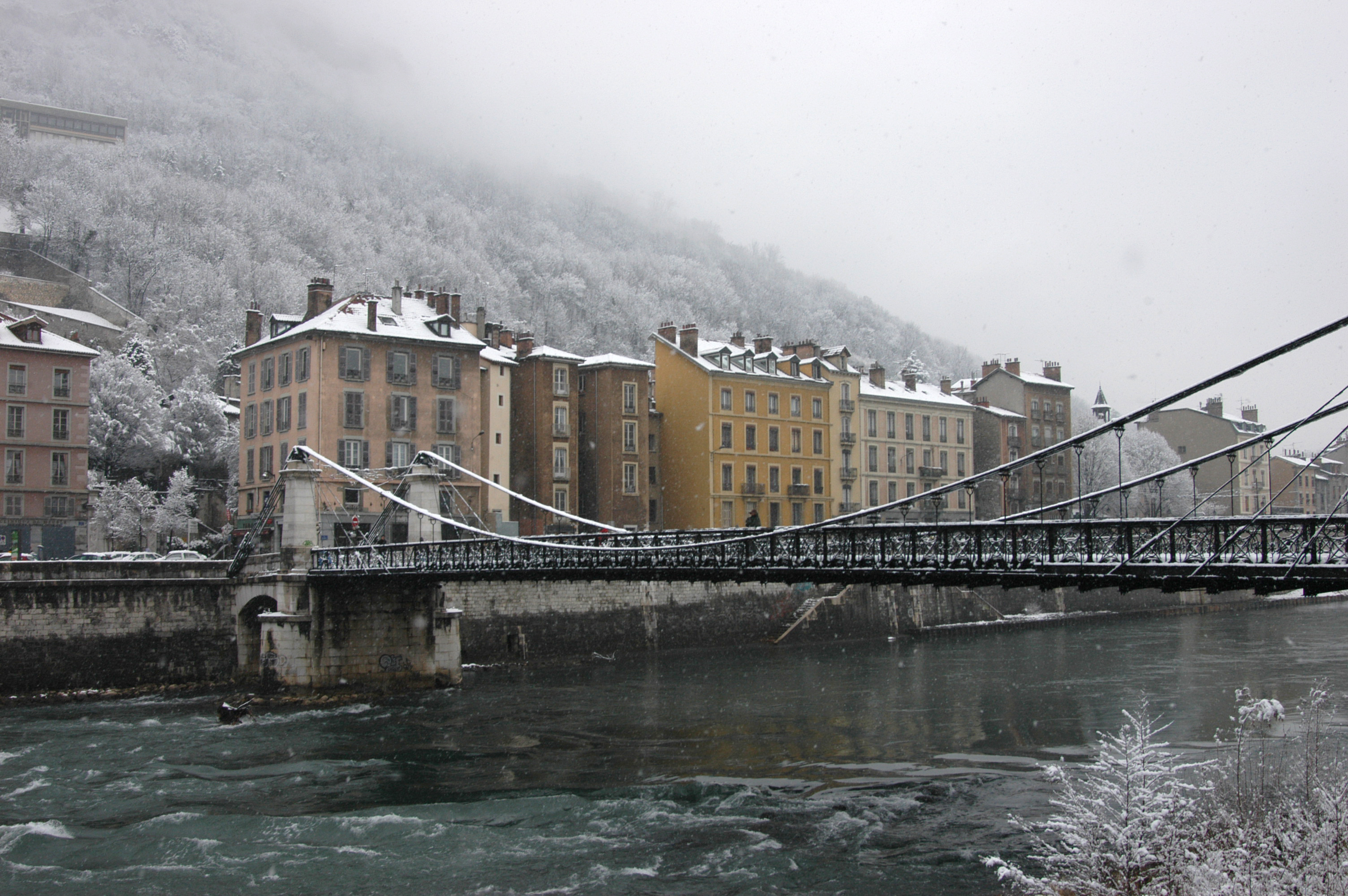 Quai Mounier